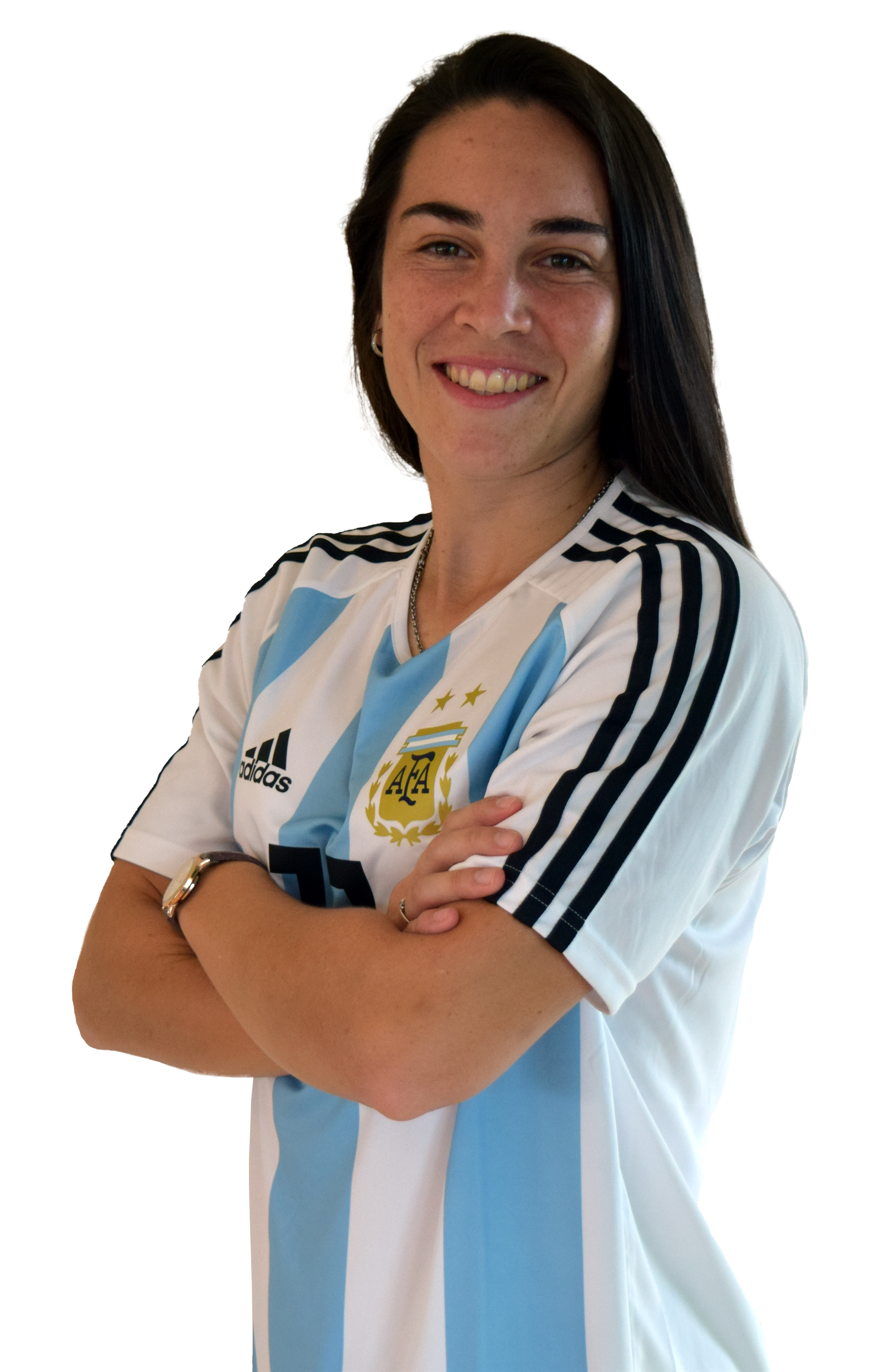 Agustina Barroso, jugadora de la selección mayor femenina de fútbol de Argentina.Foto sacada previo al primer partido del repechaje por un lugar para el mundial de futbol femenino de Francia 2019